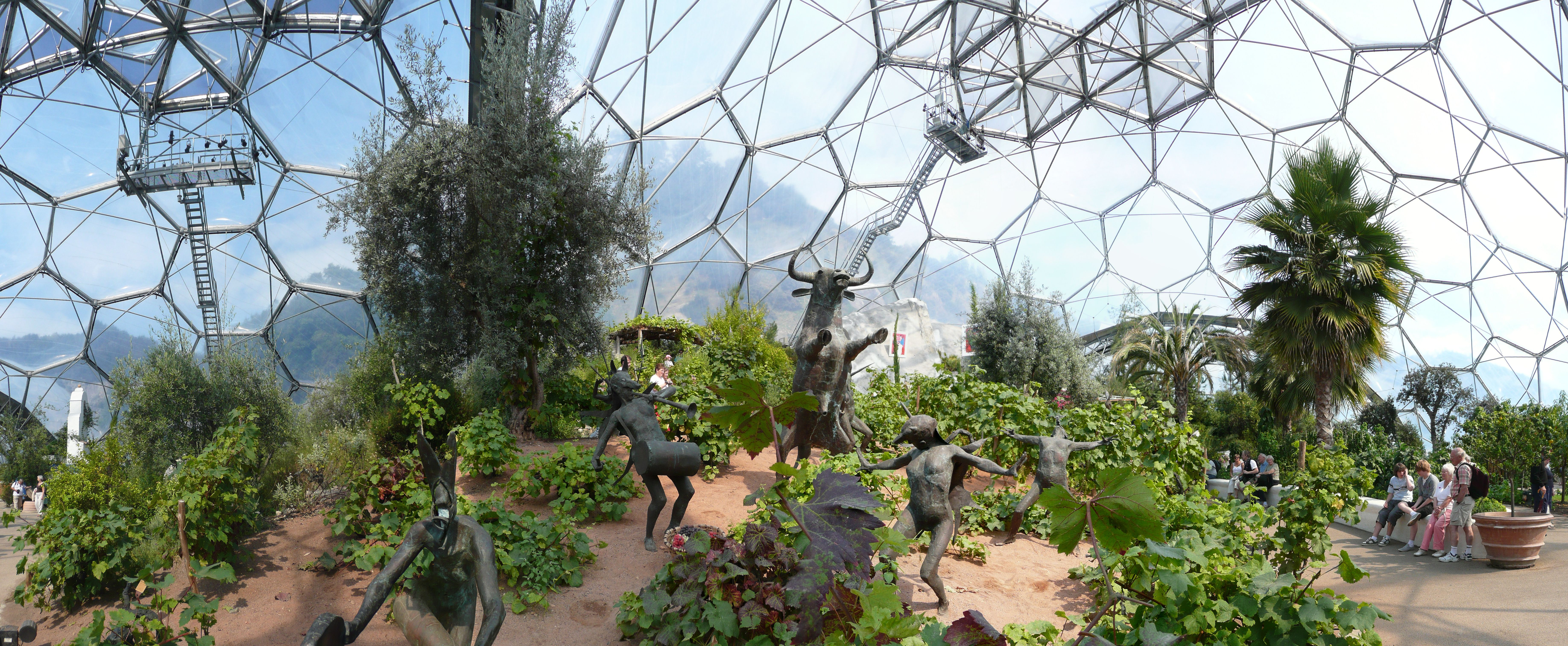 Eden Project von innen